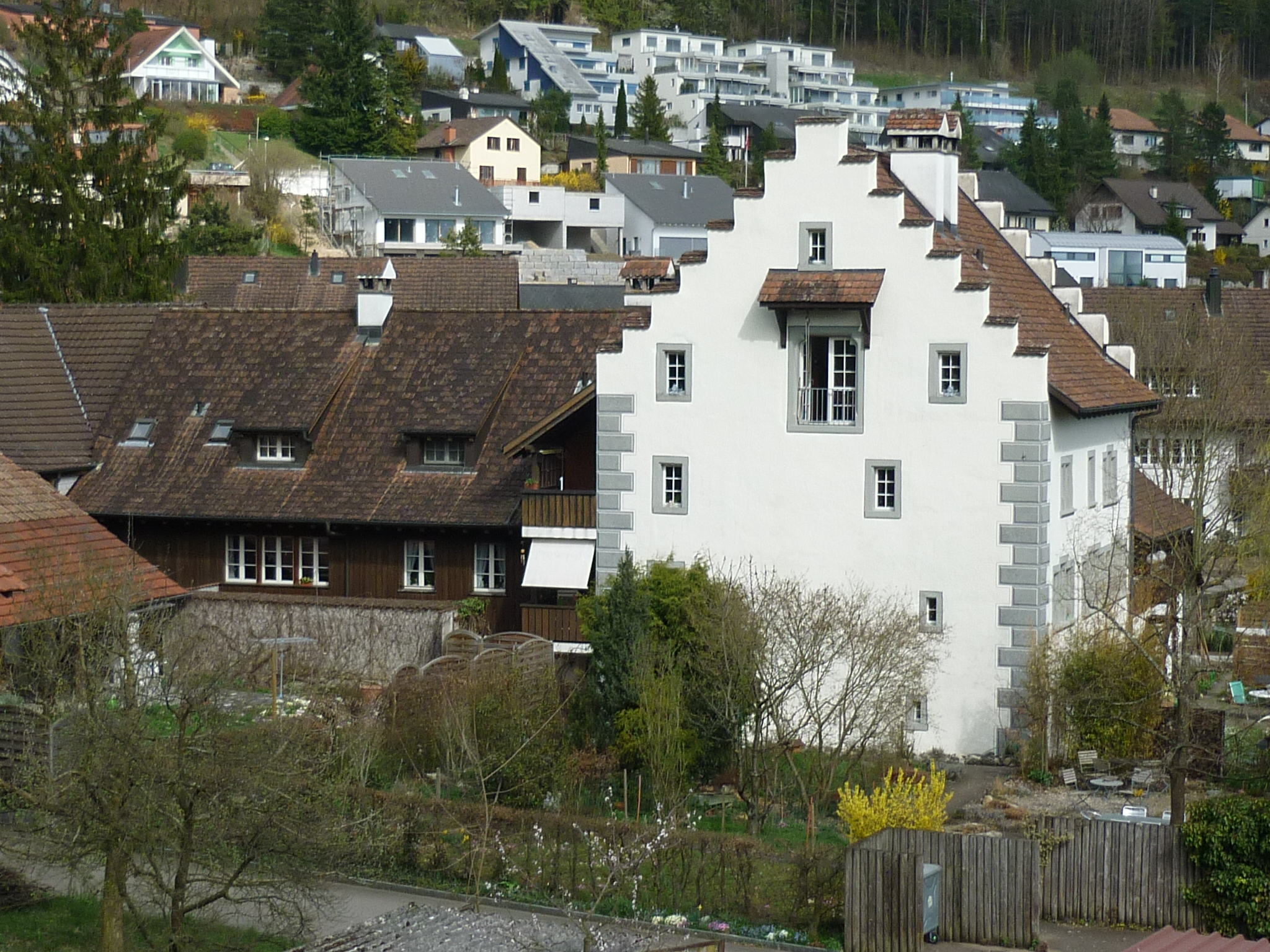 Hof Rein, Remigen AG, Schweiz